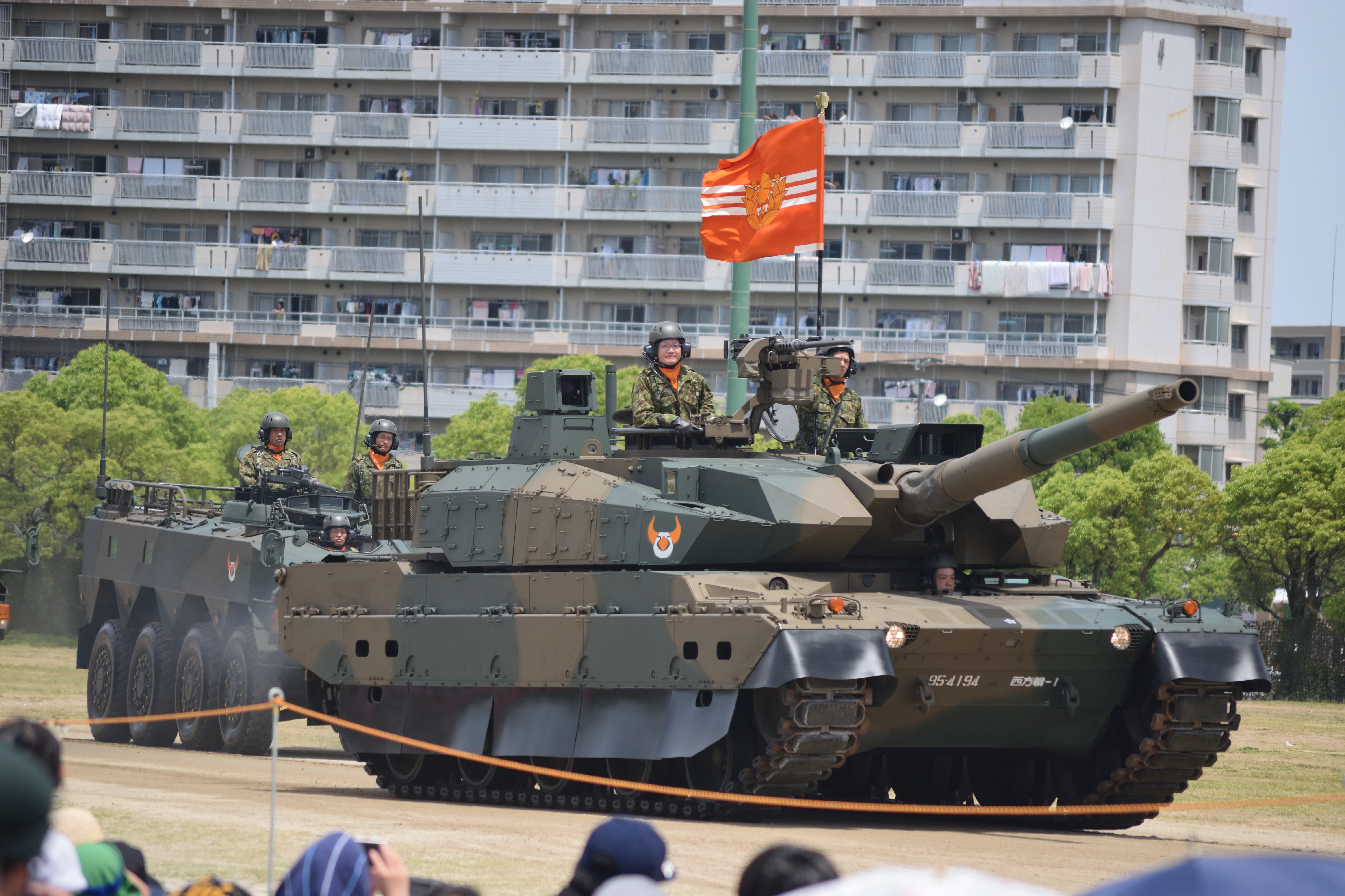 10式戦車に搭乗し、観閲行進を行う西部方面戦車隊長（初代）。「第4師団創立61周年・福岡駐屯地開設68周年記念行事」にて。 Nikon D3300